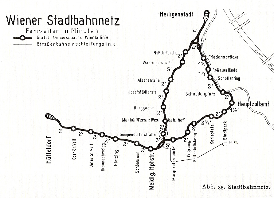 Das Wiener Stadtbahnnetz / Vienna Stadtbahn (Vienna Light Rail)